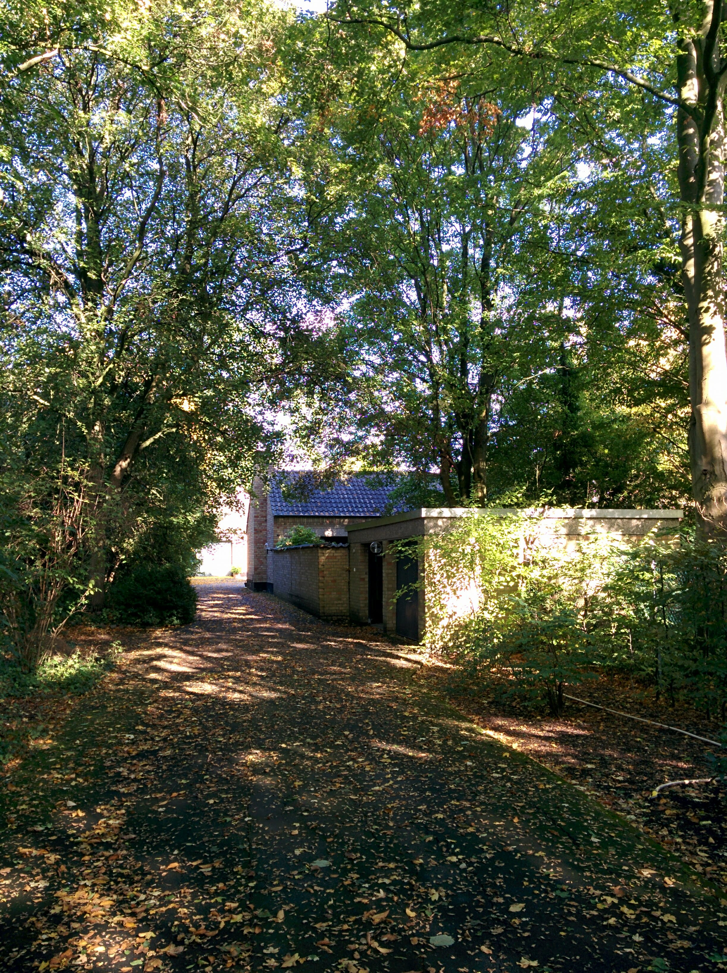 Die Einfahrt zum Haus An der Trift 9 in Hannover